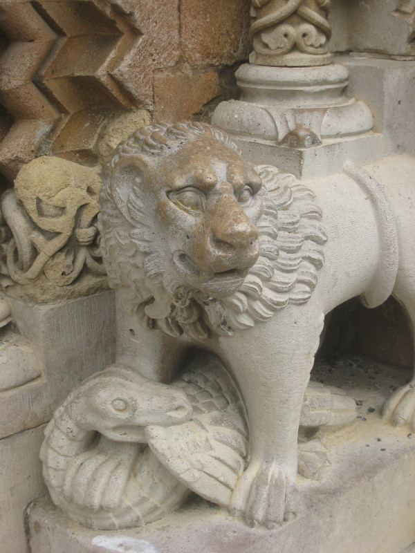 Cerkev sv. Jurija, Ják, Madžarska; lev na desni strani glavnega vhoda.